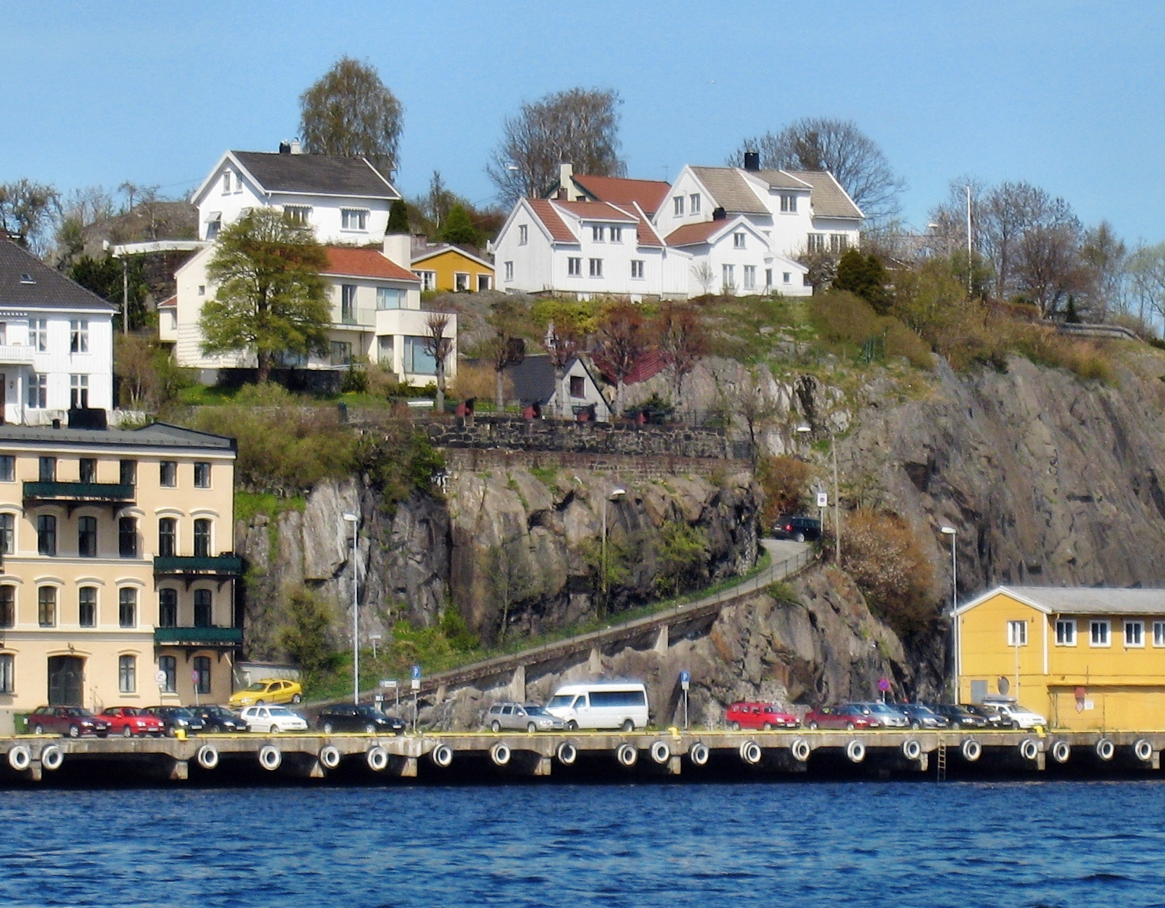 Batteriet i Arendal, gamle tollboden nede til høyre (revet idag)